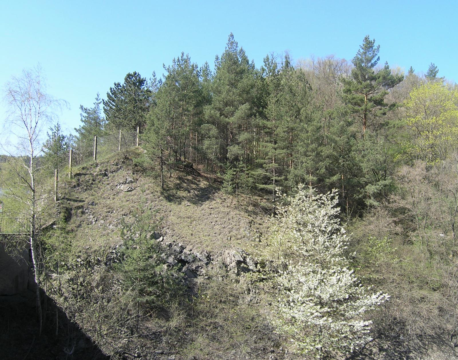 Nature reserve Lochkovský profil Národní přírodní památka Lochkovský profil